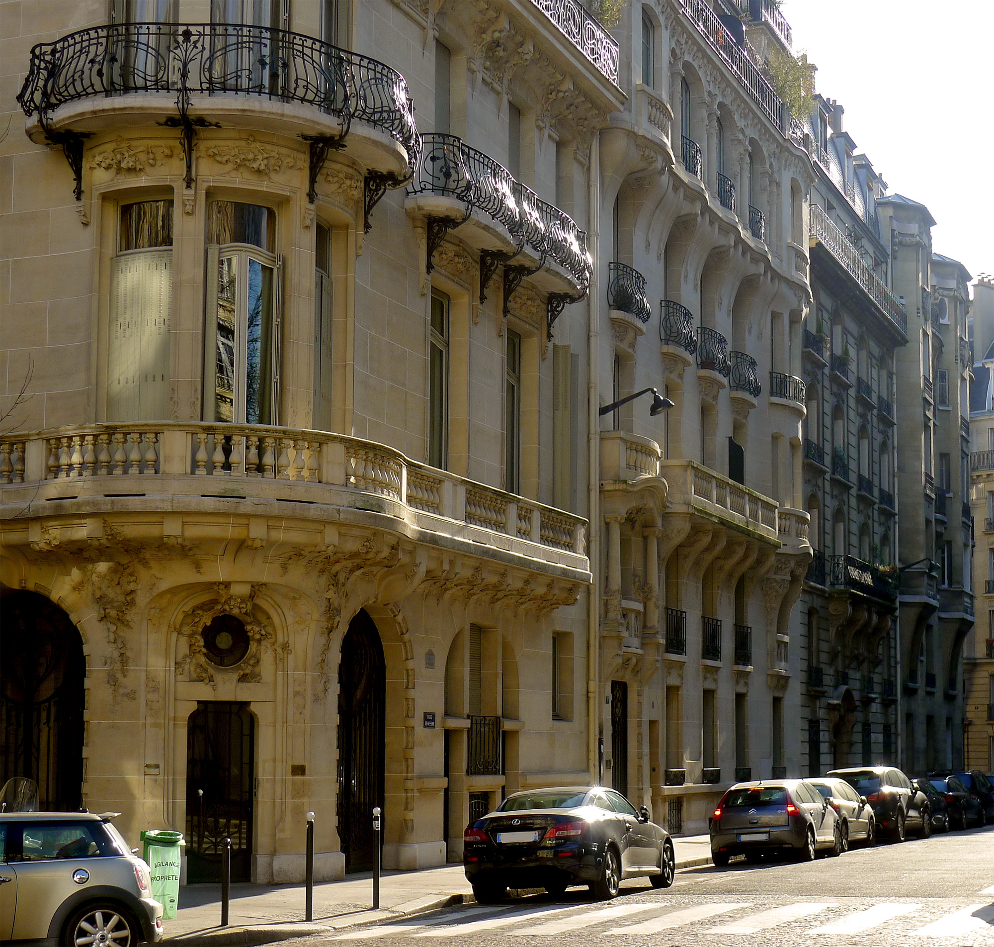 Rue de Messine - Paris VIII